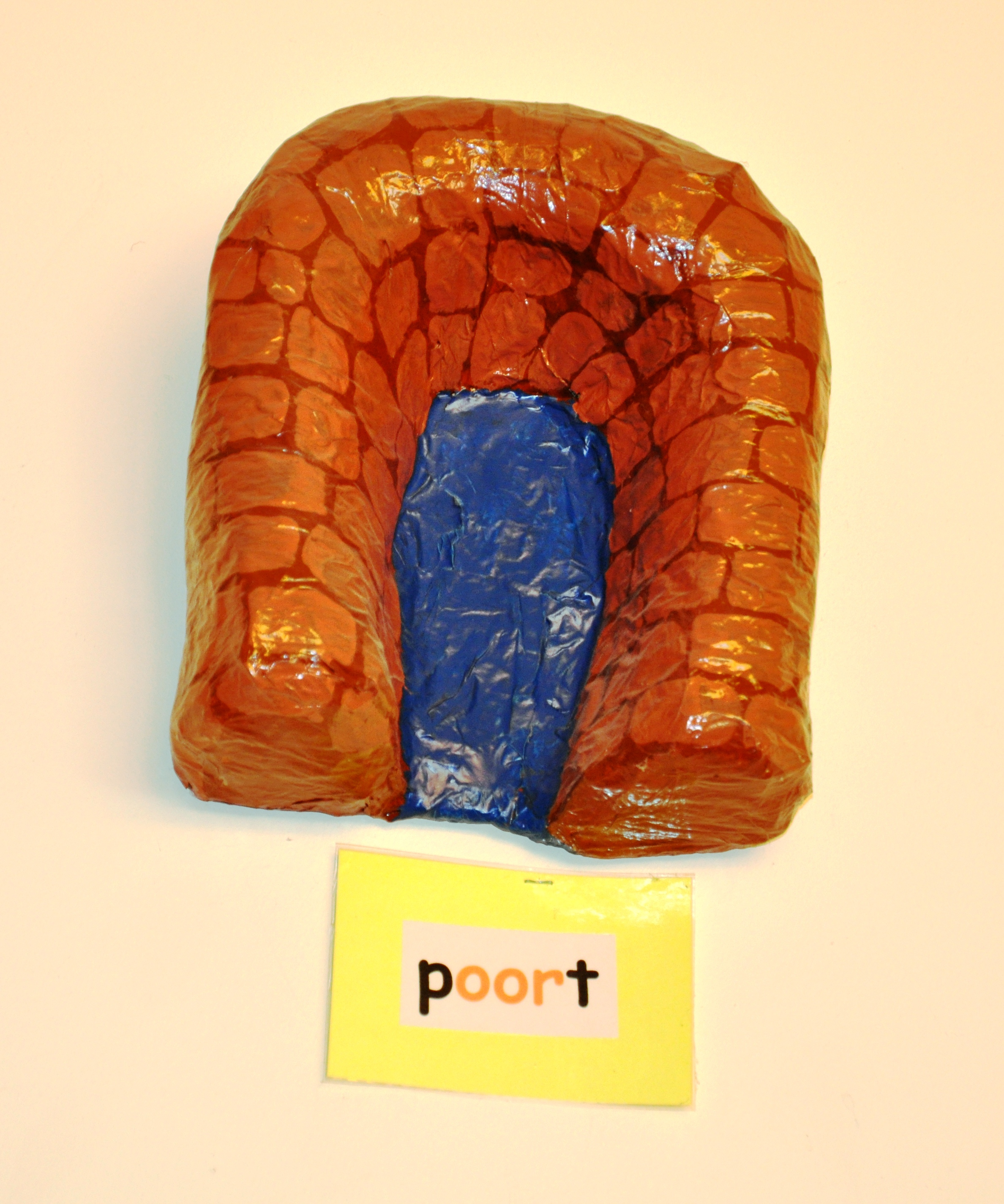 Visuele ondersteuning bij het aanvakelijk spellingonderwijs: fopletter. Je hoort een /o/ maar schrijft een /oo/.